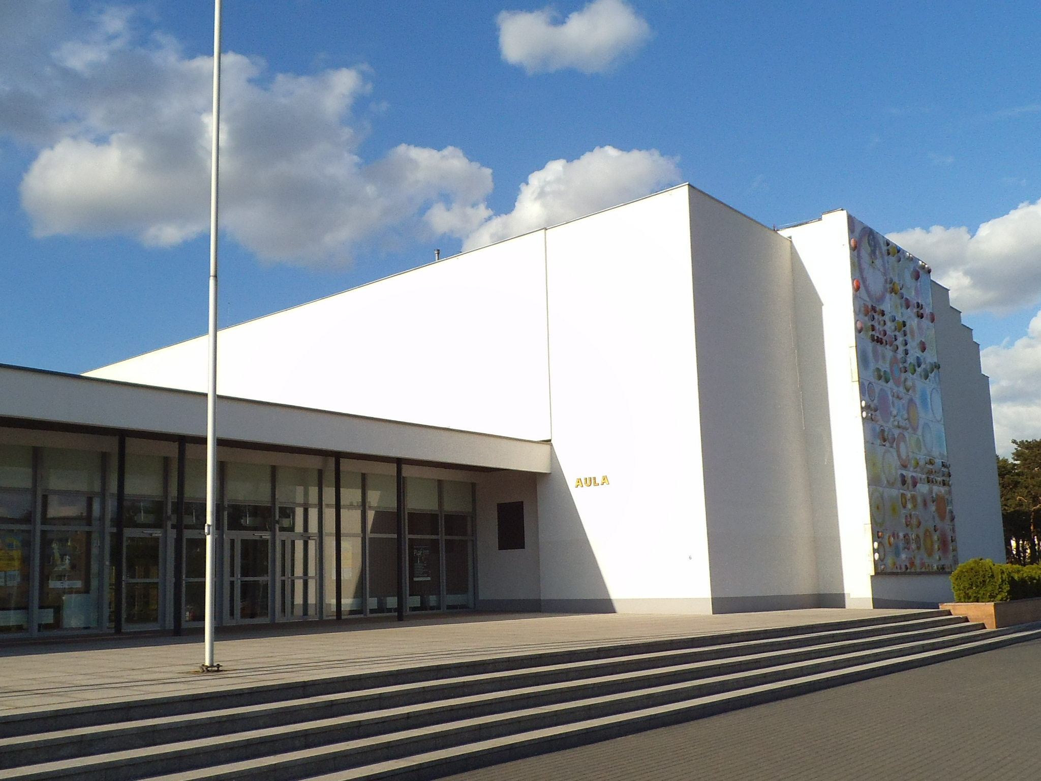 Aula UMK w Toruniu